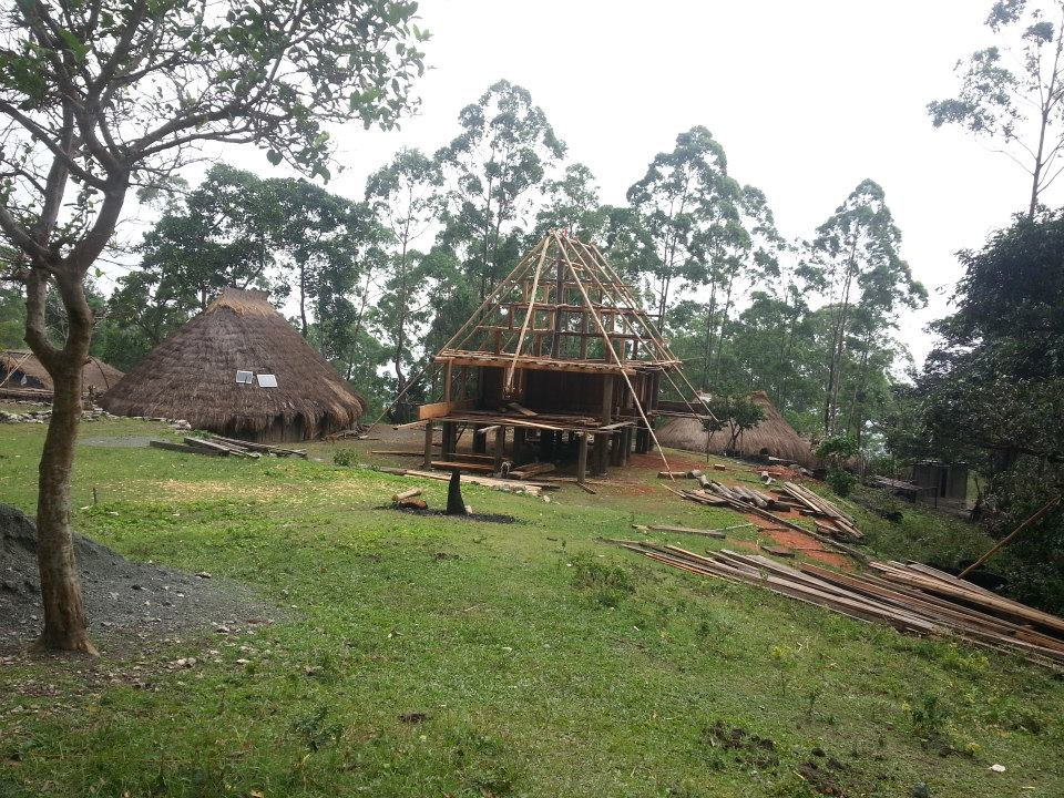 Fonte de Agua em Dato Rua,Fohorem